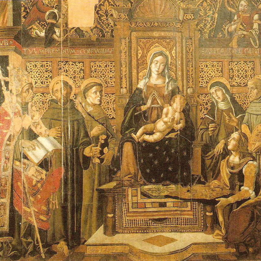 Madonna